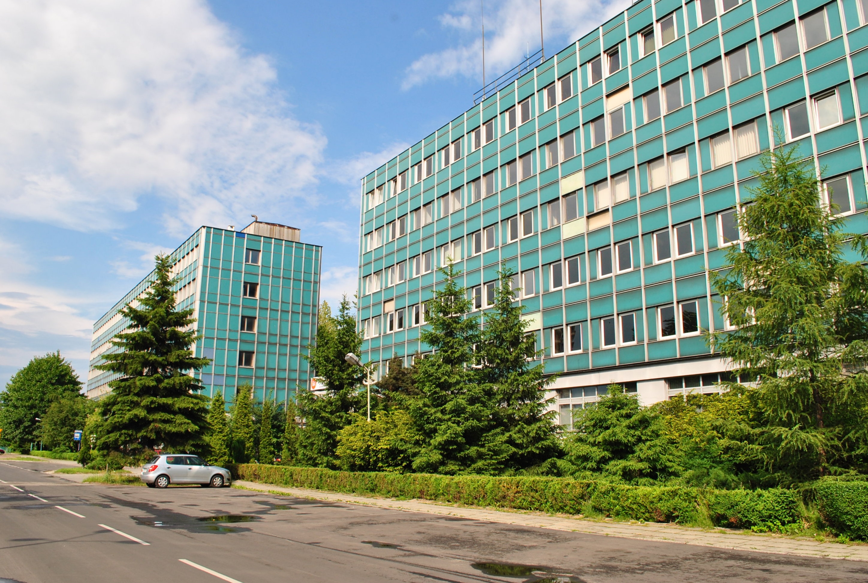 Katowice - Osiedle Witosa. Biurowce przy ul. Kossutha